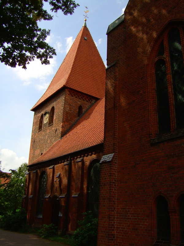 St. Michaelis Kirche in Gerdau (Niedersachsen, Deutschland)